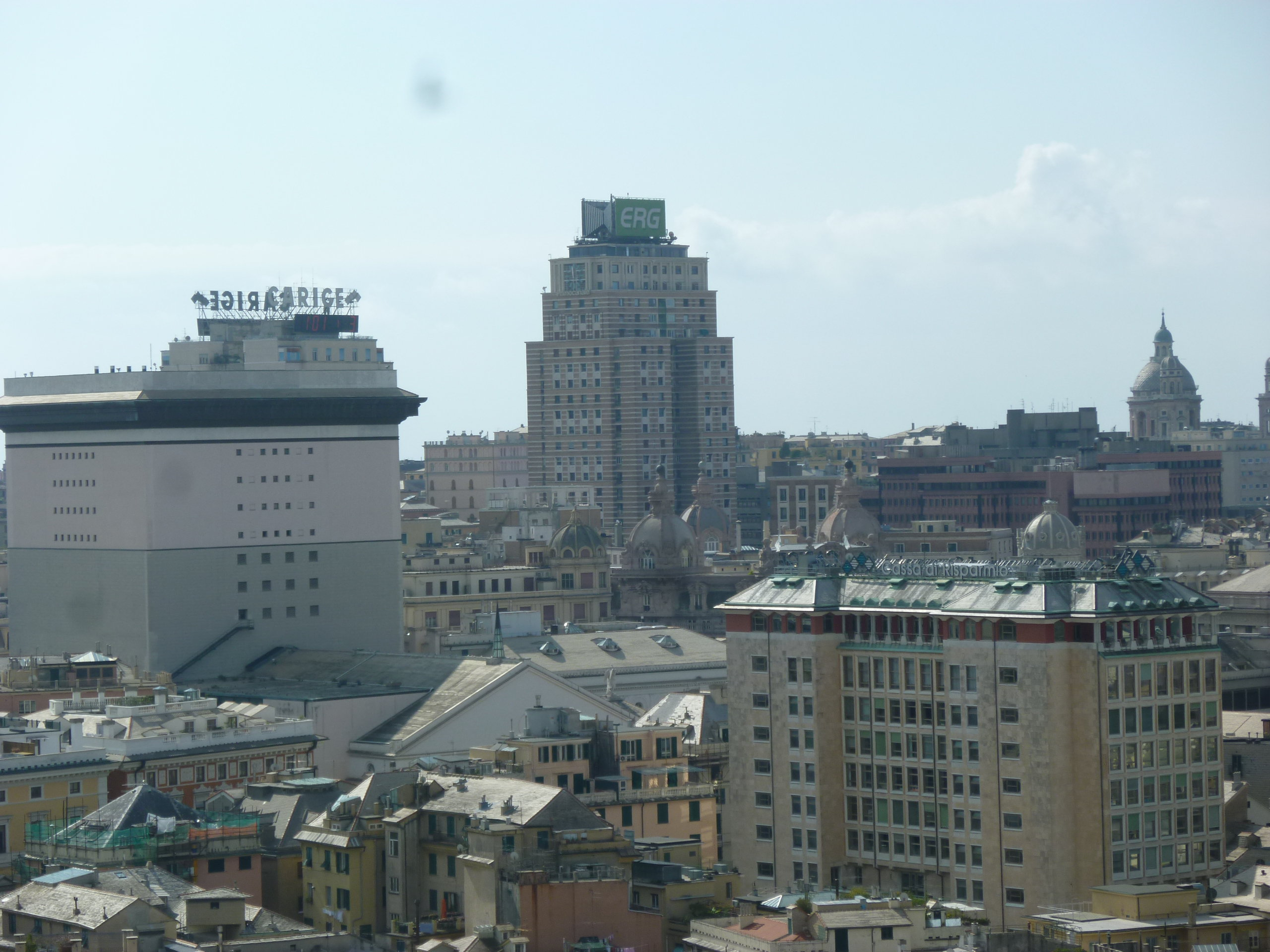 Genova, panorama del centro con la torre Piacentini e la torre scenica del teatro Carlo Felice